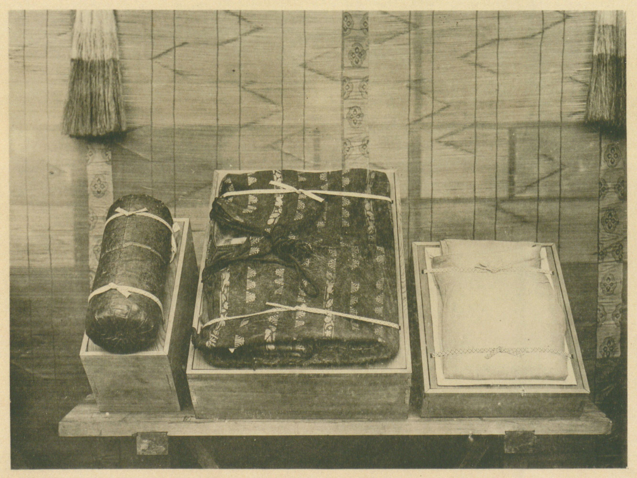 中文（台灣）: 新竹神社中北白川宮能久親王的物品